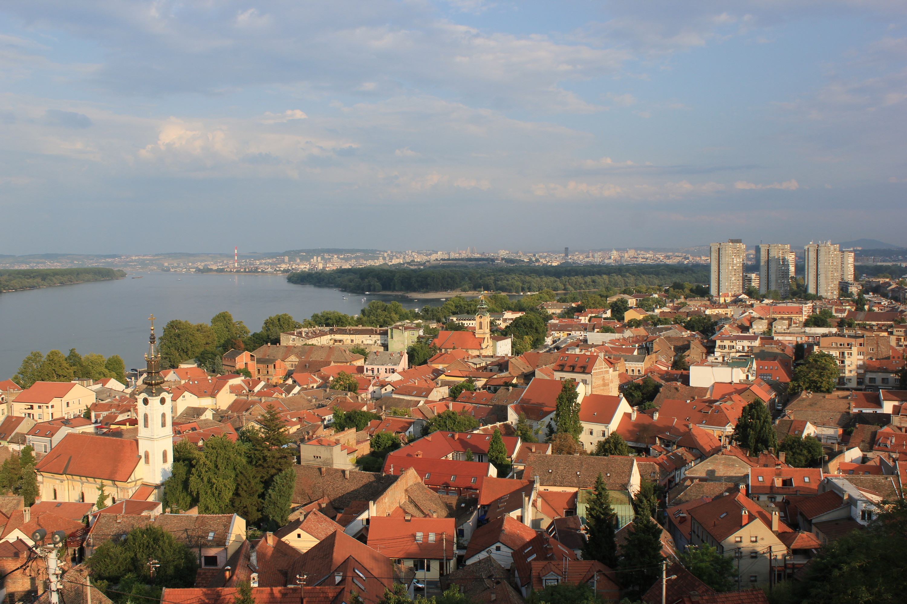 Blick über Zemun auf die Donau, Serbien.